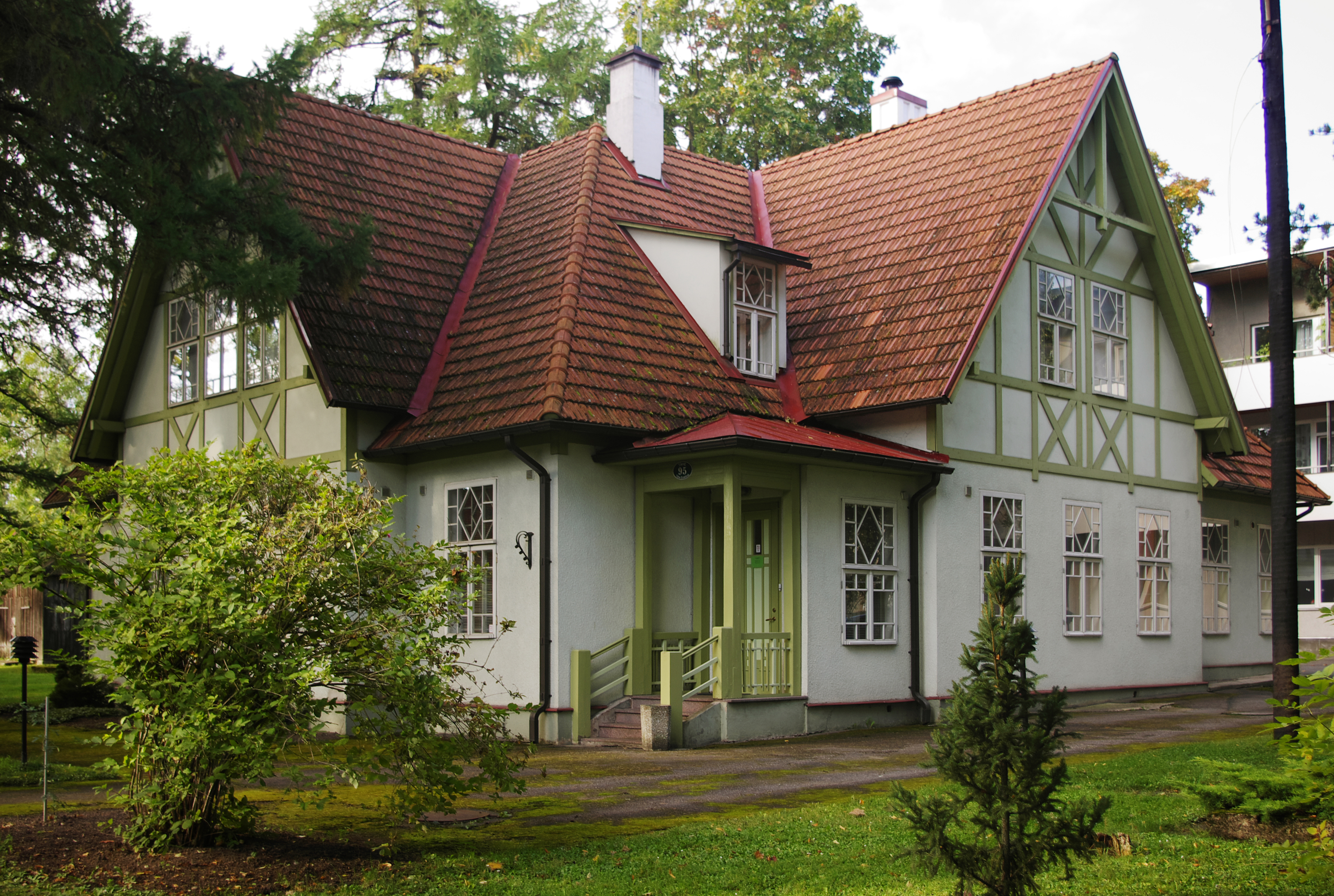 Elamu Tartus Tähe 95, 1914-1920.a.